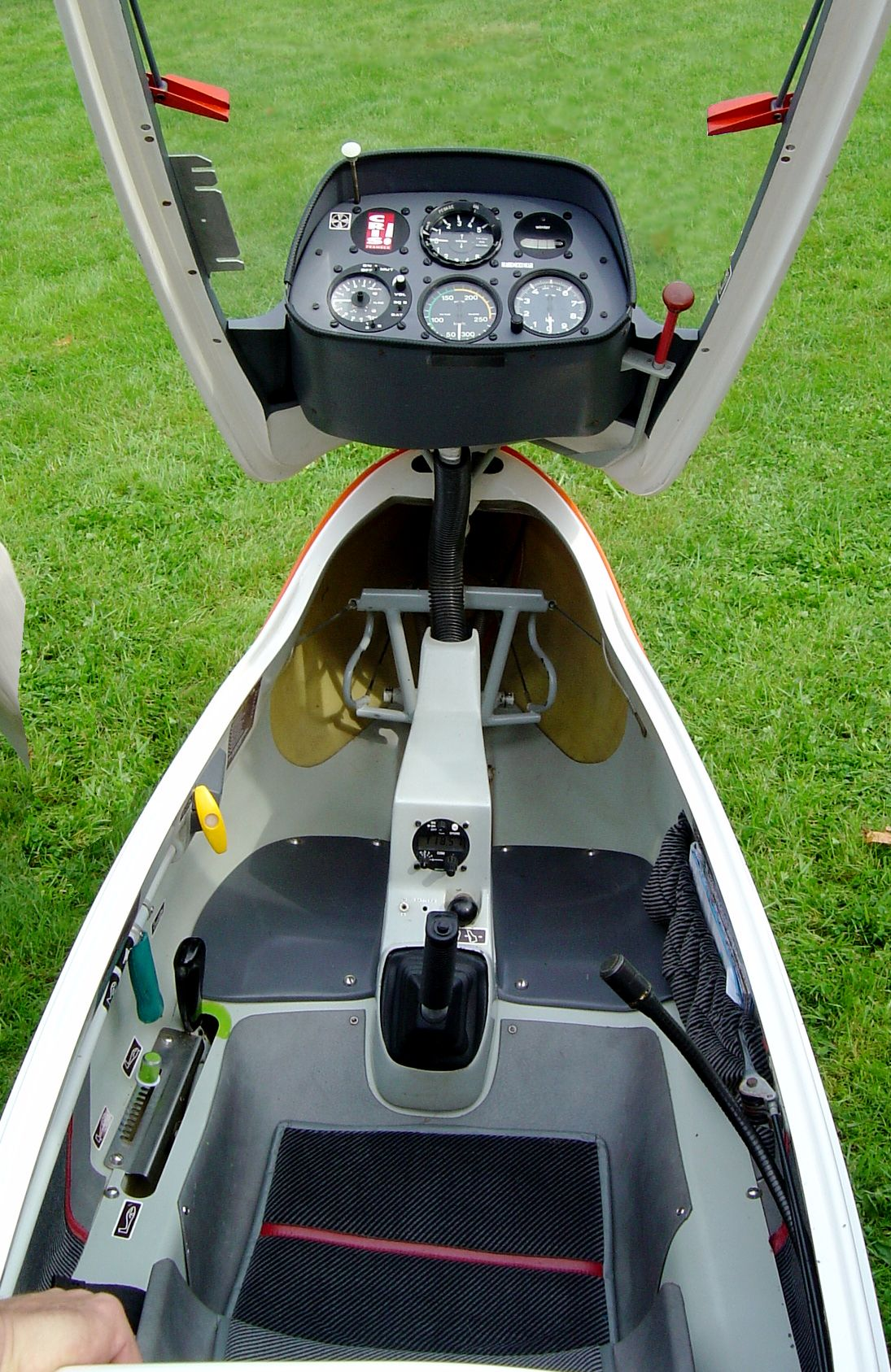 intérieur d'une cabine de planeur monoplace (Pégase 90).